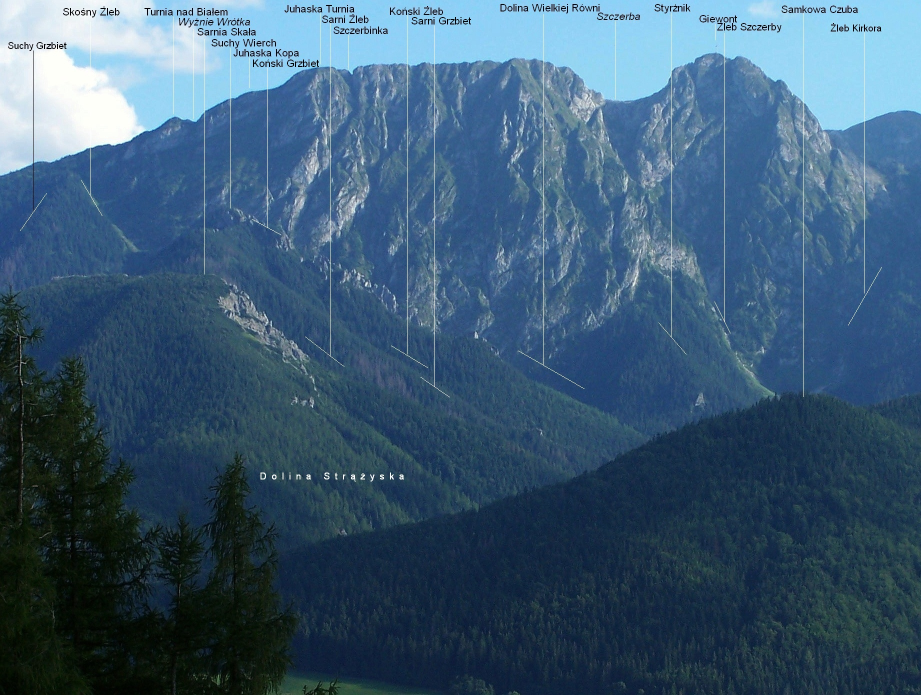 Widok z Butorowego Wierchu